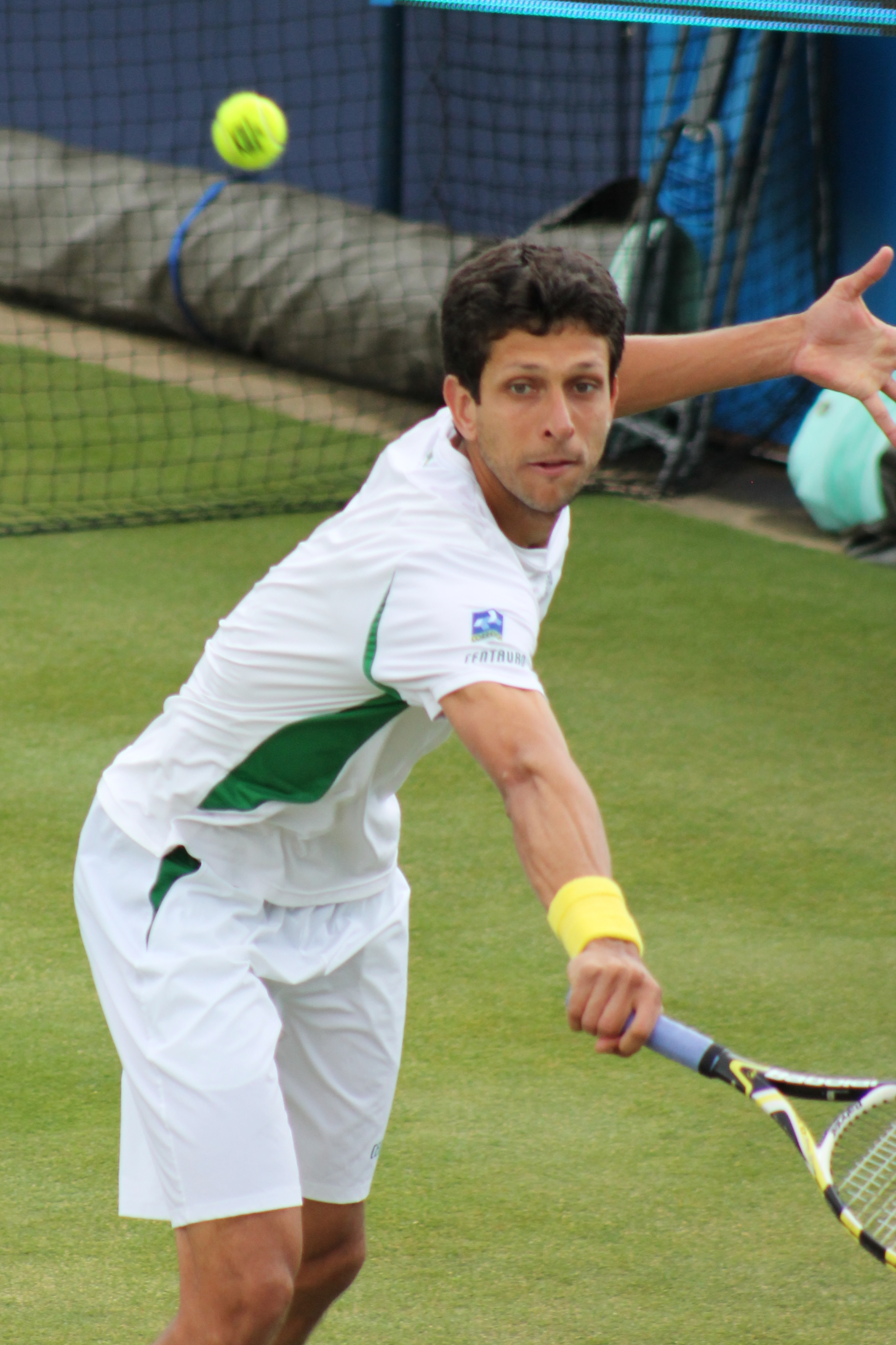 Melo QC13-007